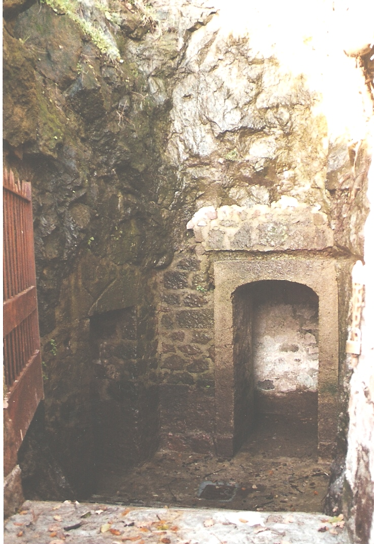 Bortigali: l'ingresso al rifugio antiaereo che vide, nel 1943, la nascita di Radio Sardegna.